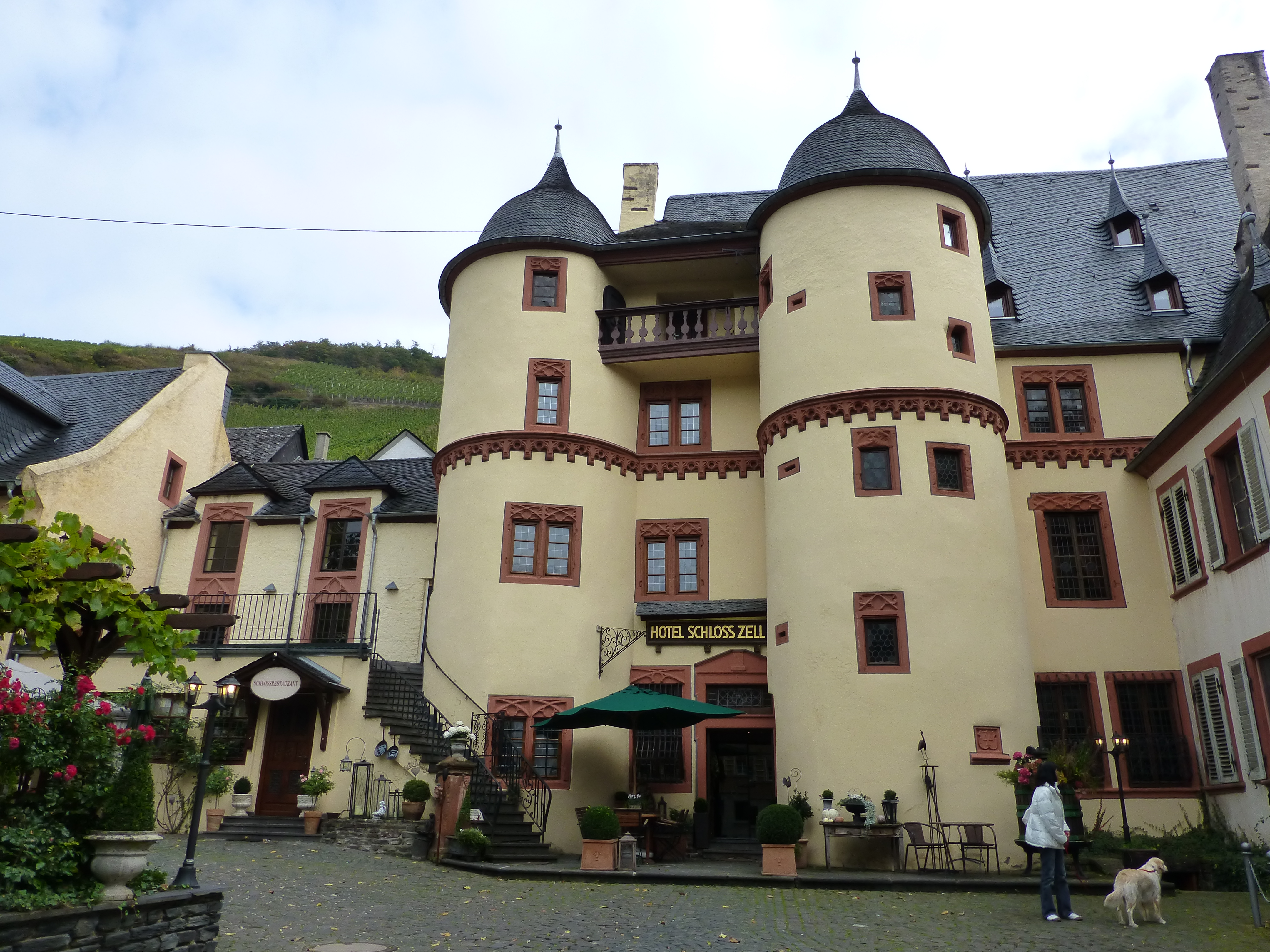 Zell /Mosel - Schloß Zell - Hotel und Weinvertrieb GmbH - Schlossstraße 8 a